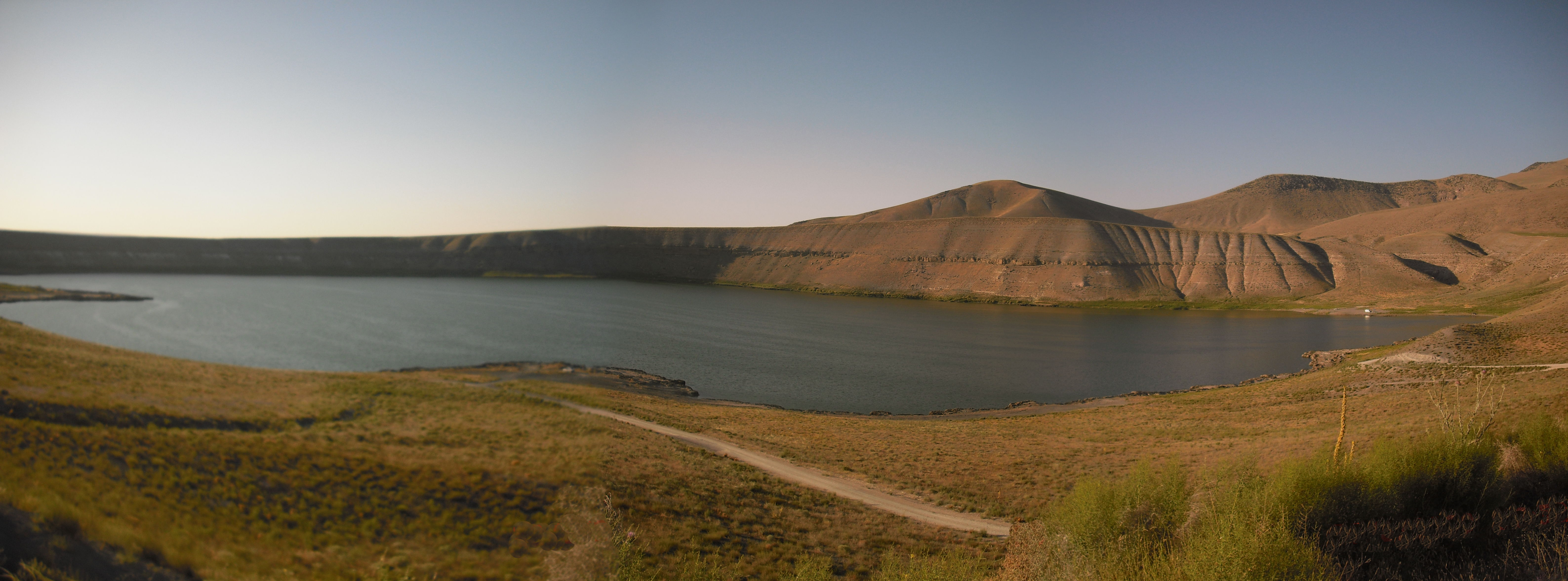 Acıgöl, Konya.